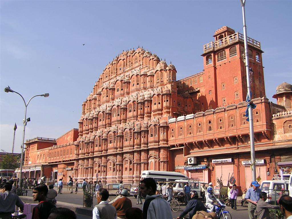 Palast der Winde - Jaipur Der Palast der Winde, ein Teil des Stadtpalstes in Jaipur.